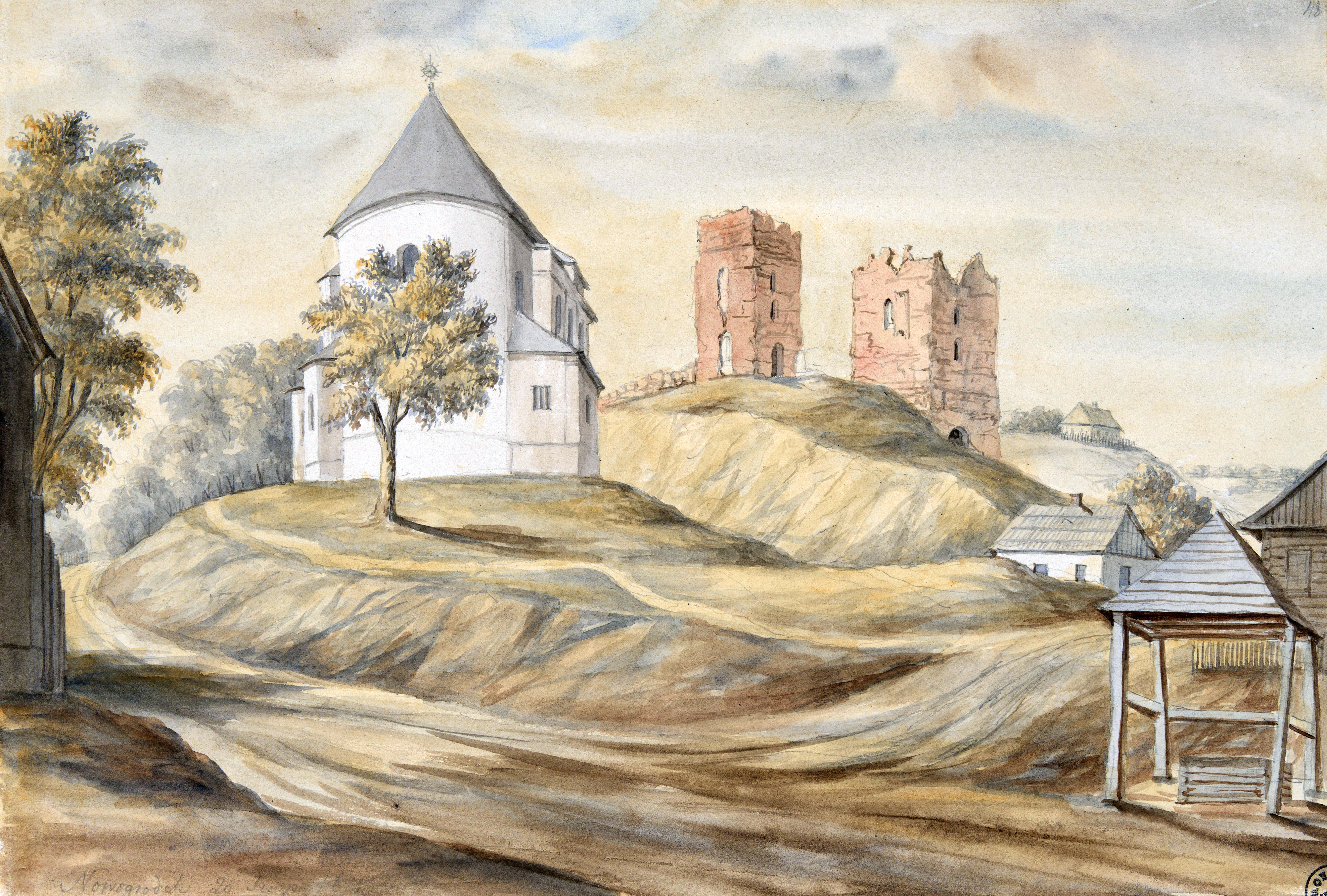 Беларуская (тарашкевіца): Наваградак (Navahradak), вуліца Кавальская (vulica Kavalskaja). Замак і Фара